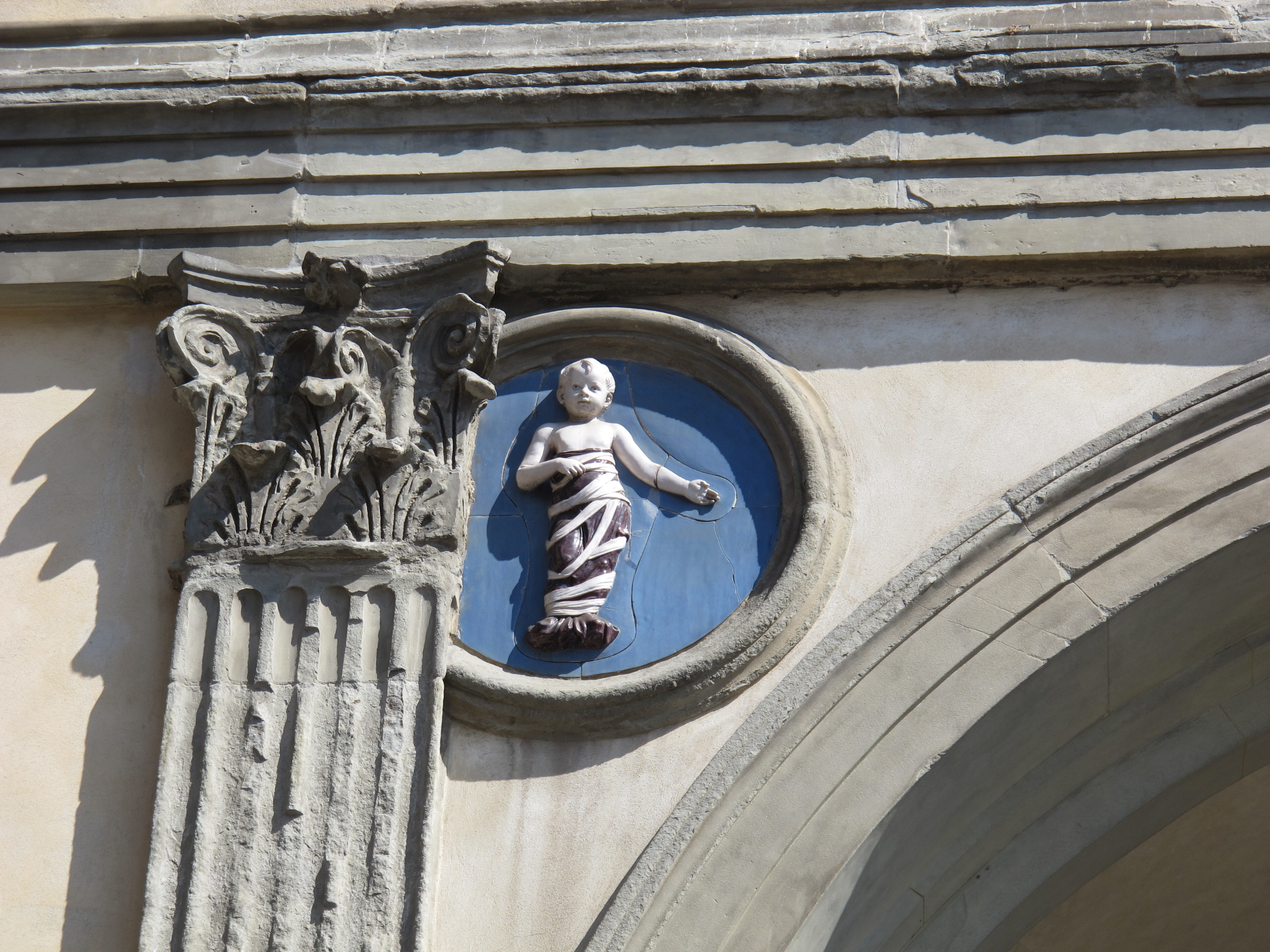 Spedale innocenti, putto